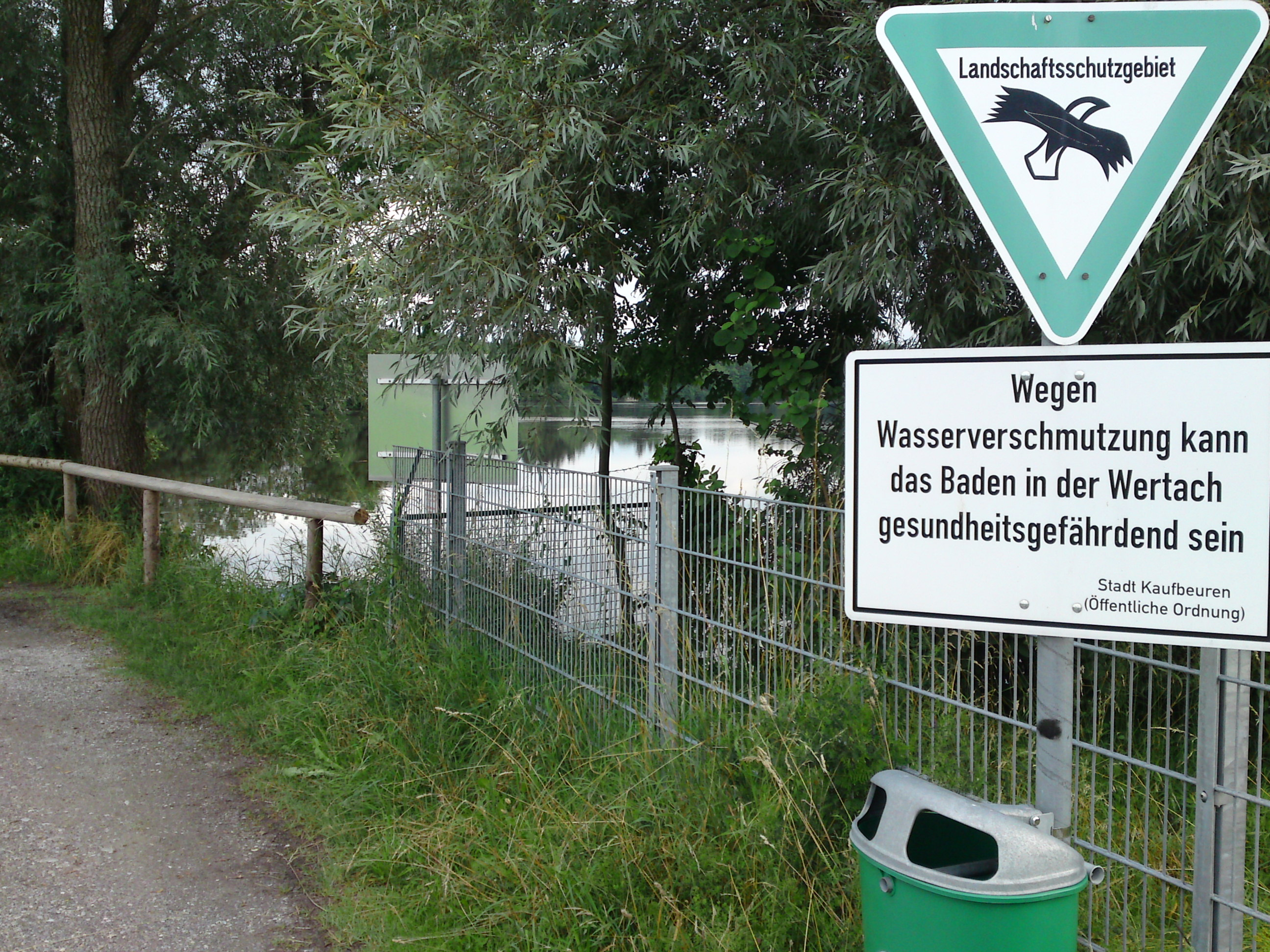 Warnschild am Bärensee, Landschaftsschutzgebiet